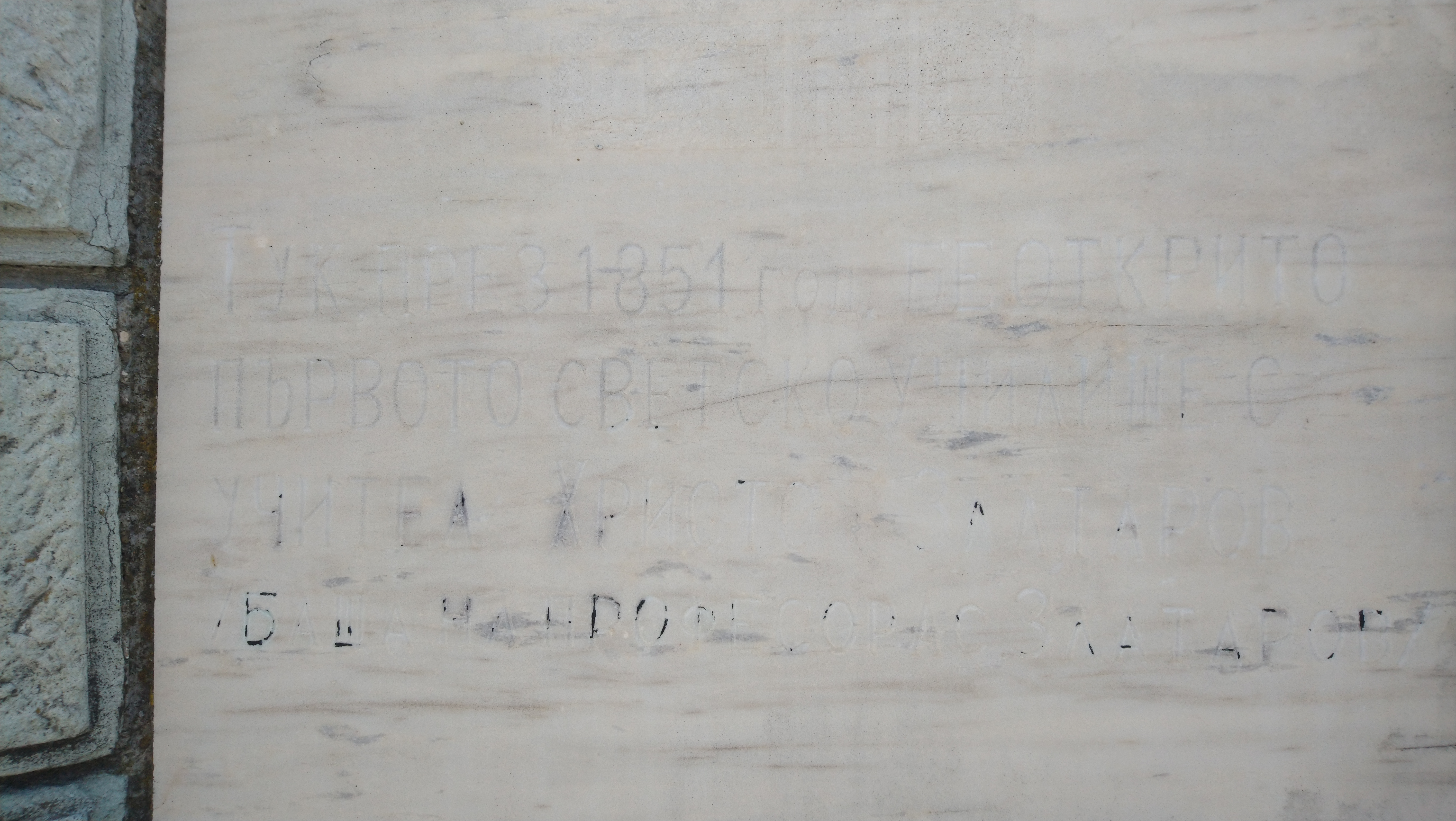 Паметната плоча за основаното през 1851 г. първо светско училище в село Стамболово, Хасковско, в което учител е бил Христо Златаров, баща на проф. Асен Златаров. Плочата отдалеч: File:Stambolovo 1851 school memorial 1.jpg